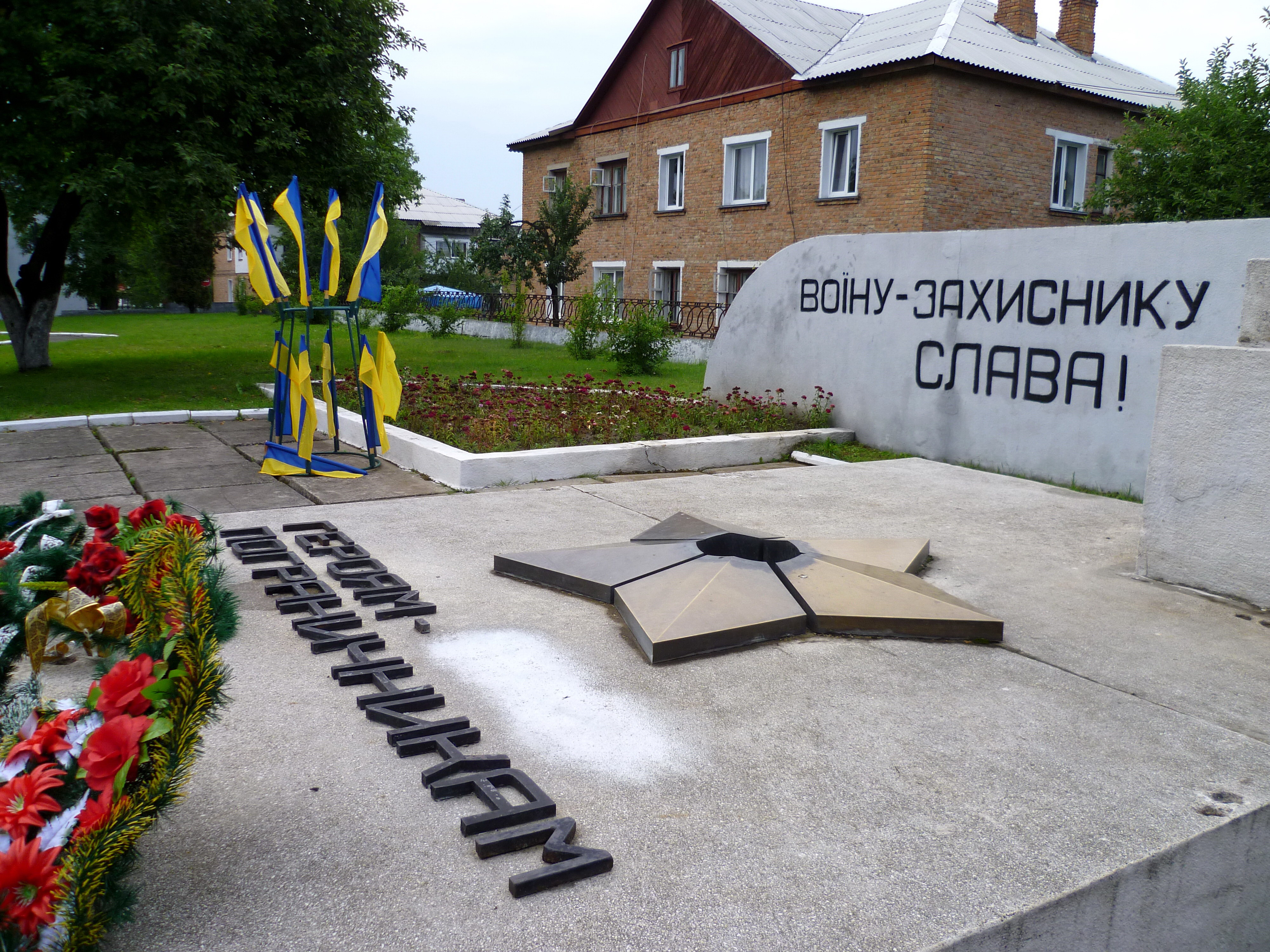 Пам’ятник на честь радянських прикордонників (встановлено у 1982 році) - "вічний вогонь" - м.Нововолинськ (бульвар Шевченка)Волинська область Україна